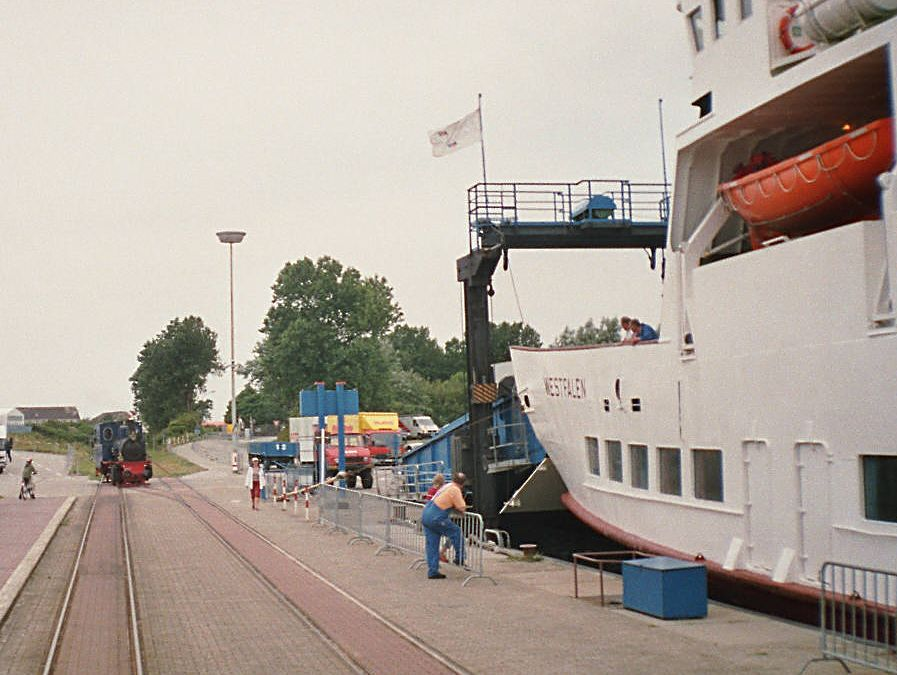 Borkumer Mole